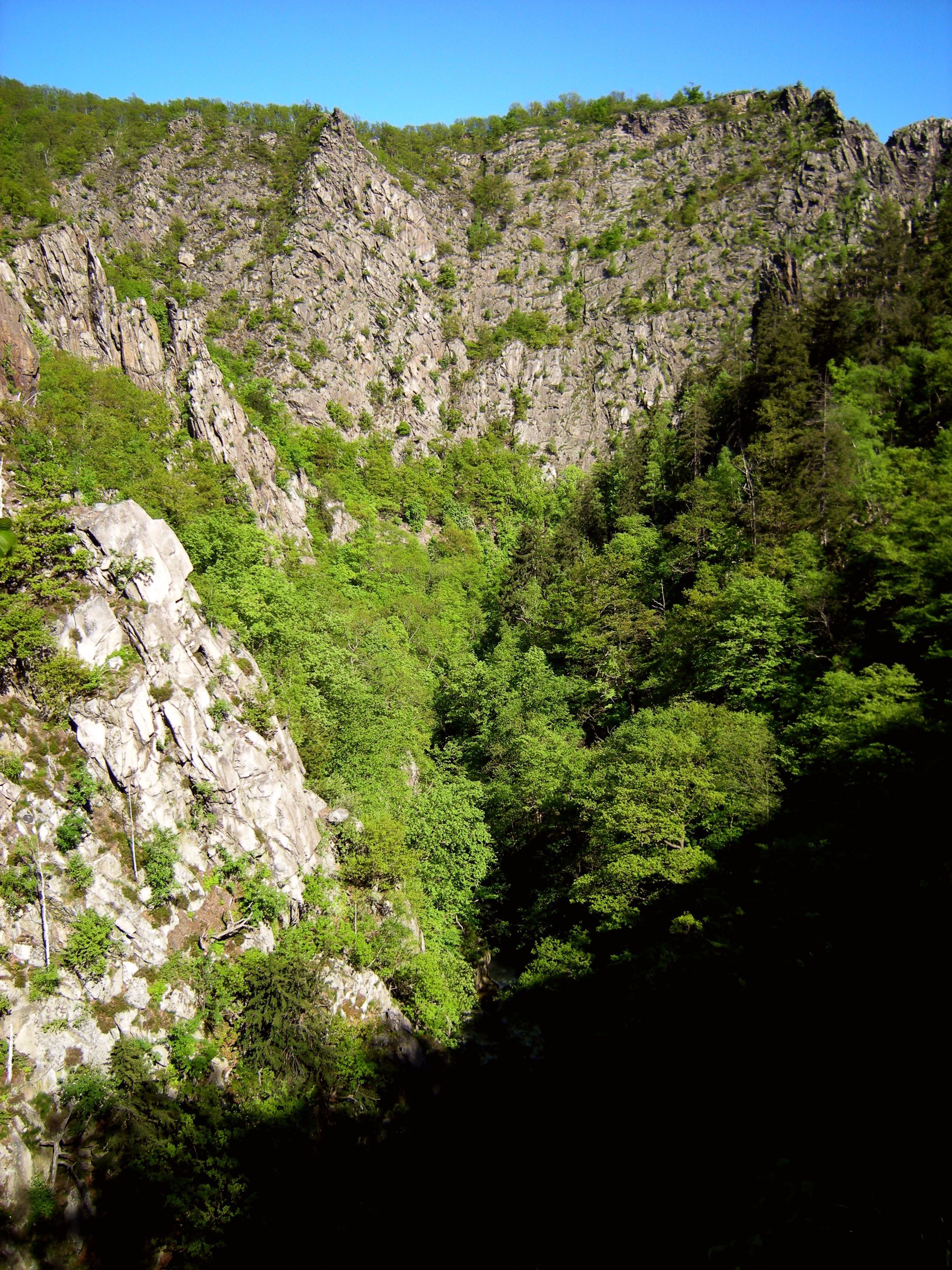 Bodeschlucht bei Thale_03.jpg